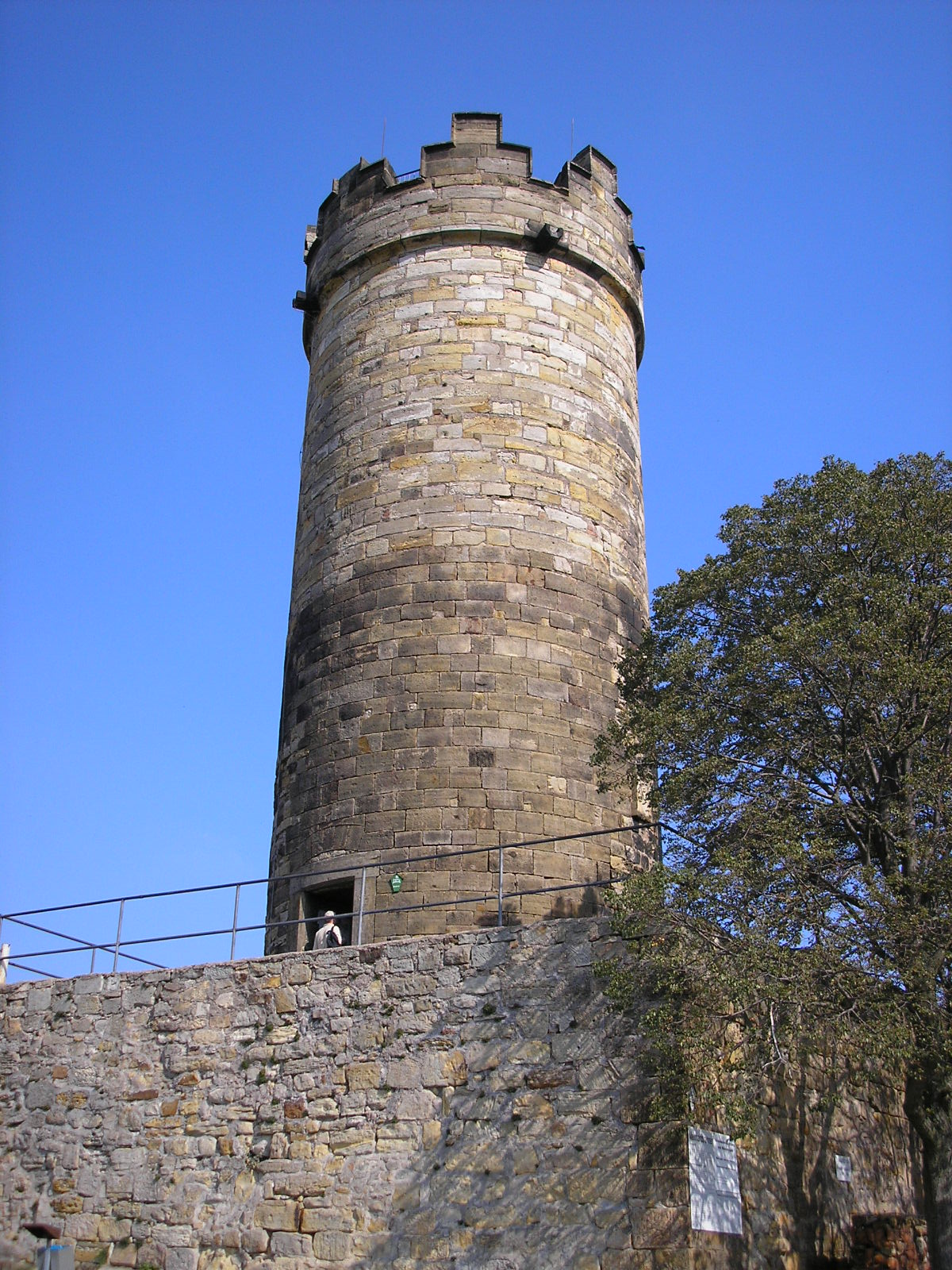 Der Bergfried der Mühlburg bei Mühlberg (Thüringen).